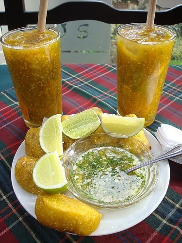 Tradicional bebida sudamericana como se sirve hecha en Cali- Colombia